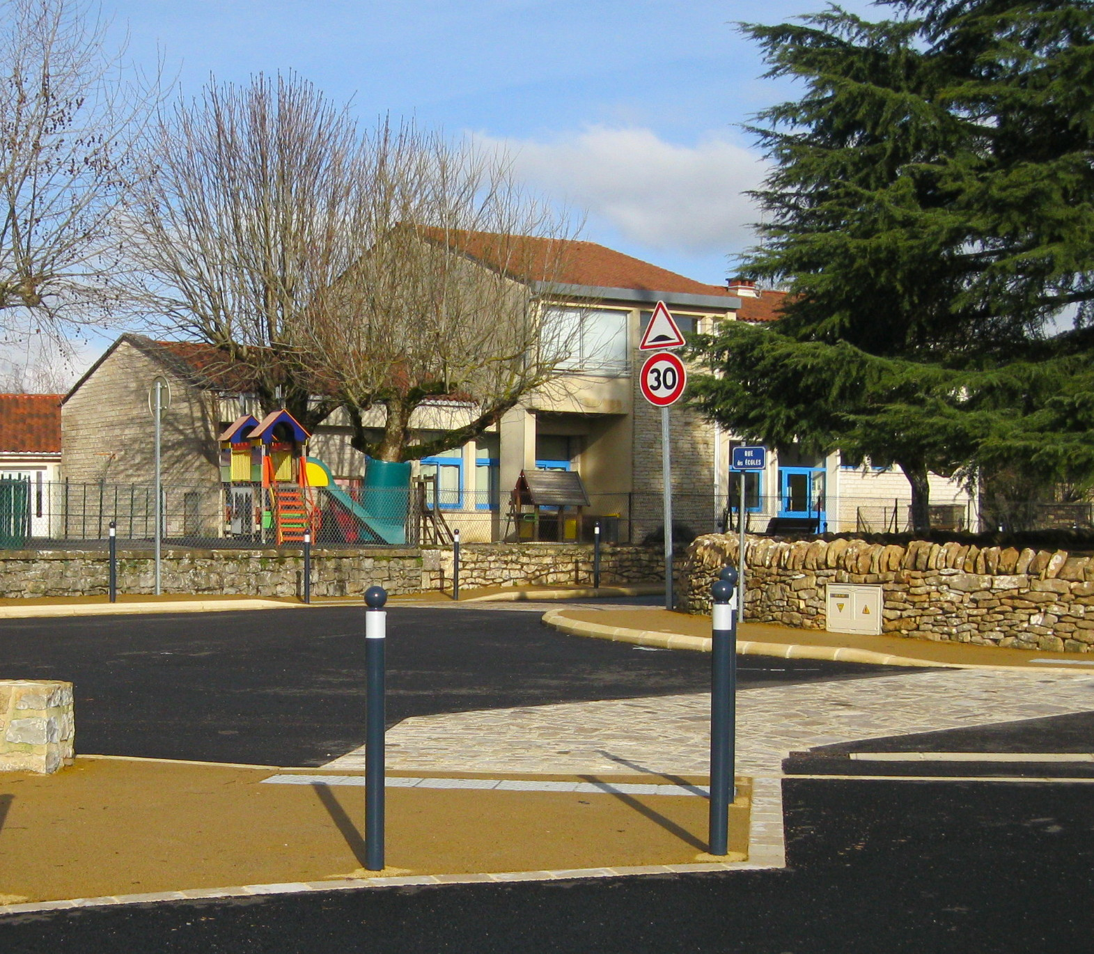 Vue du bâtiment de l'école maternelle du village d'Alvignac (Lot, France)